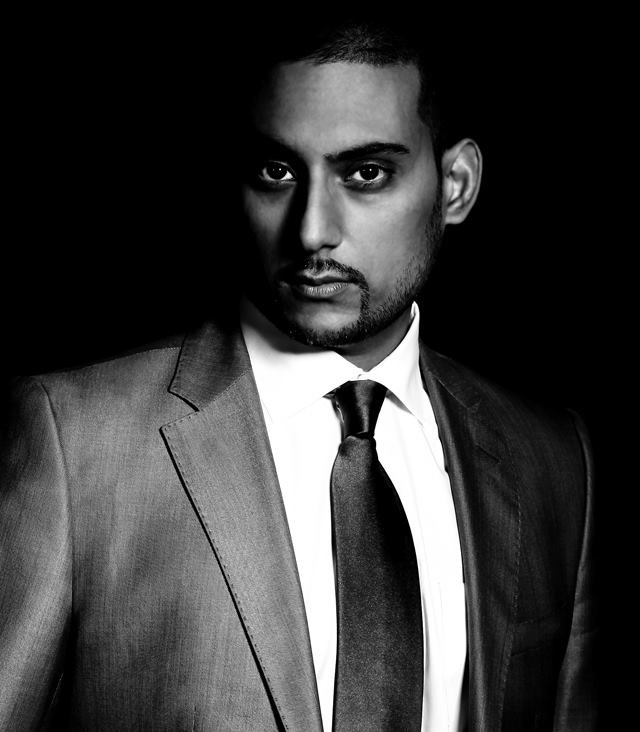 MIZBEATZ